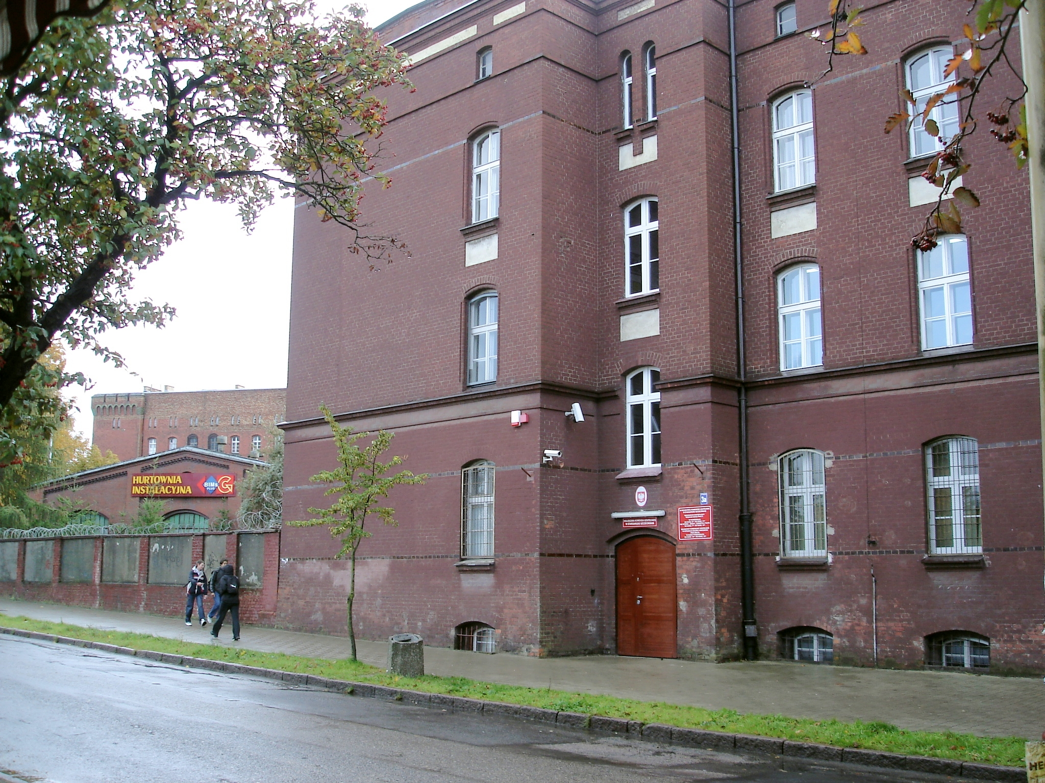 WKU w Stargardzie Szczecińskim